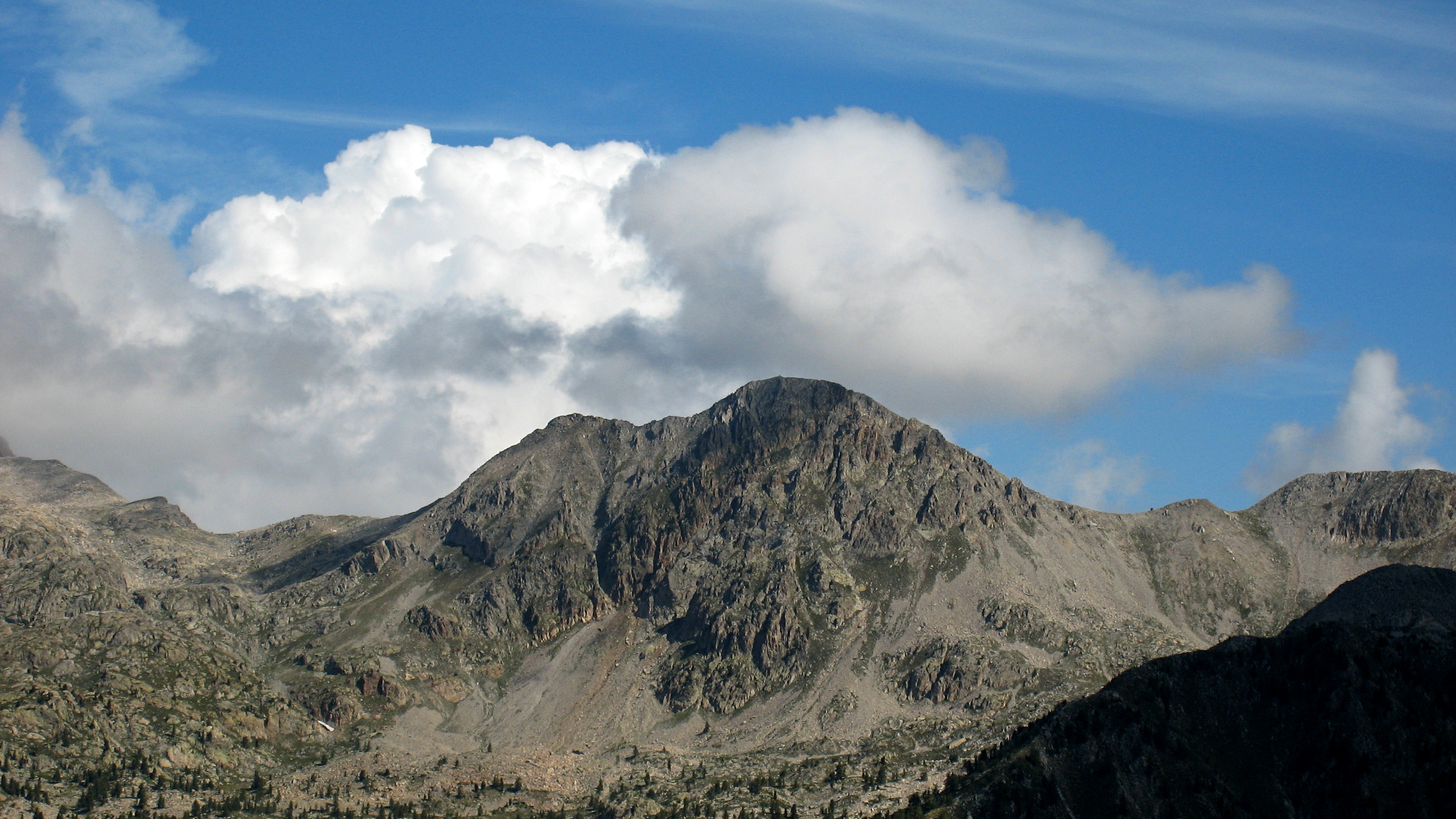 Cime de Fremamorte Parc national du Mercantour